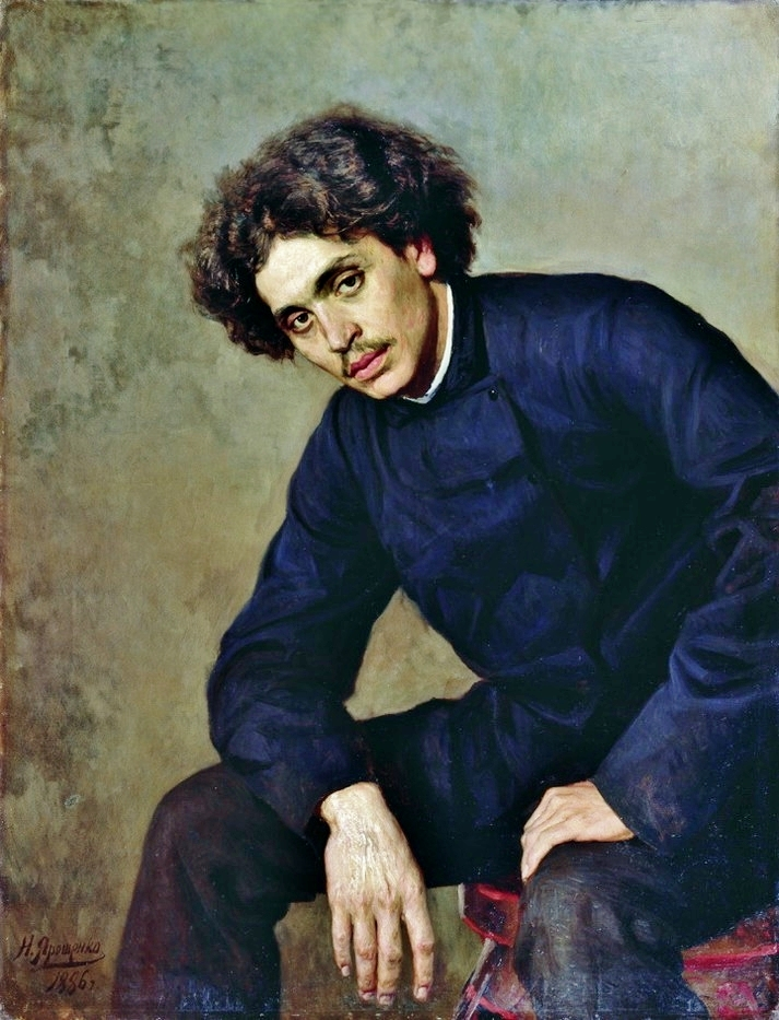 Ярошенко Николай "Портрет молодого человека" 1886 Холст, масло 101х77 Кировский областной художественный музей